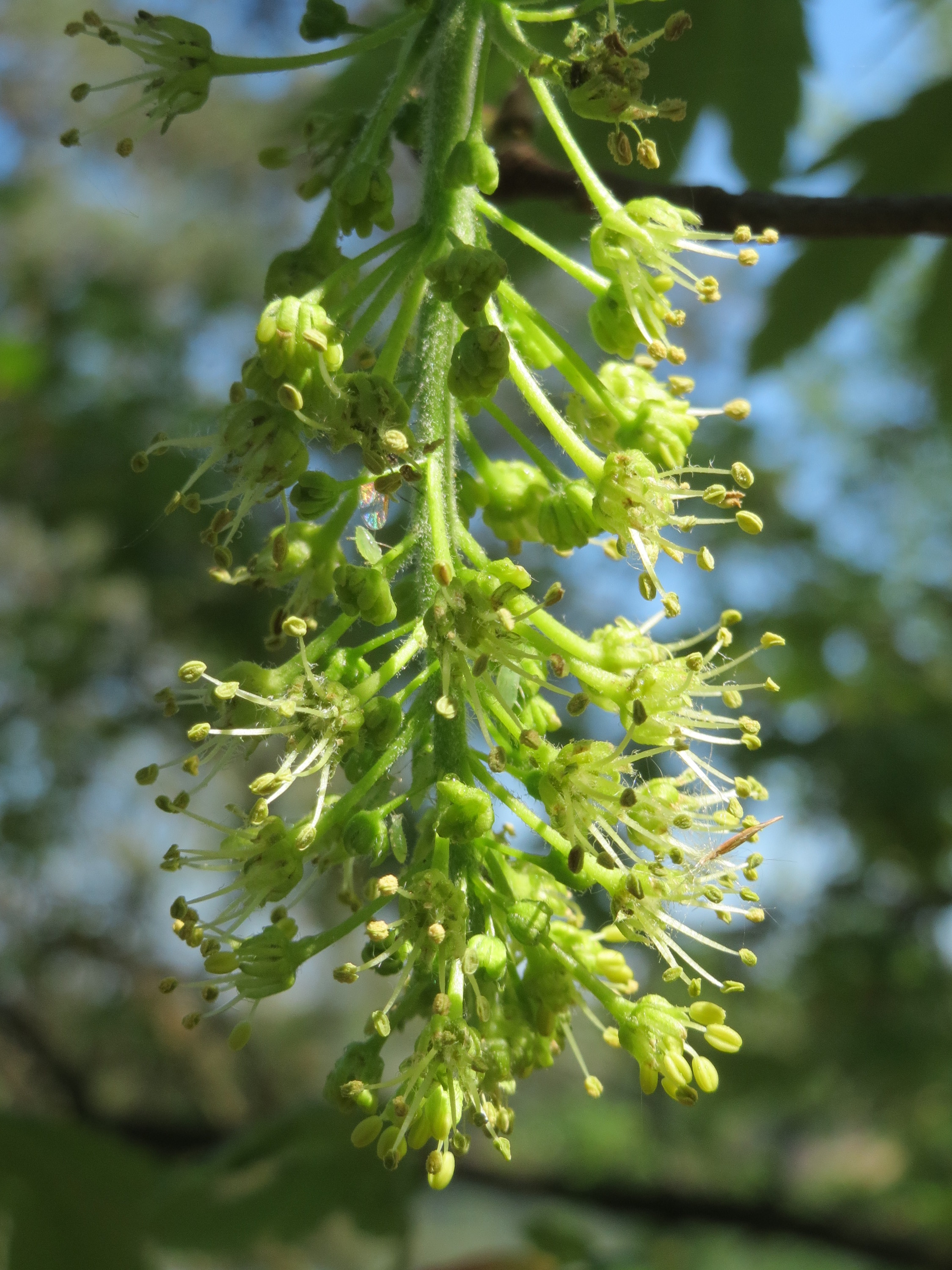 Bergahorn (Acer pseudoplatanus) im Schwetzinger Hardt